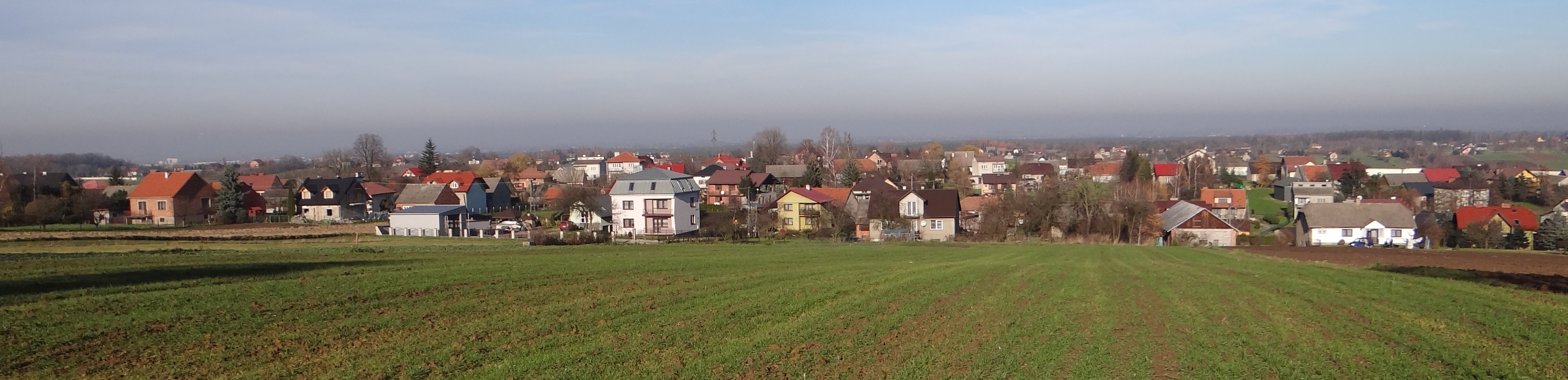 Panorama wsi Brzezie (spod cmentarza)